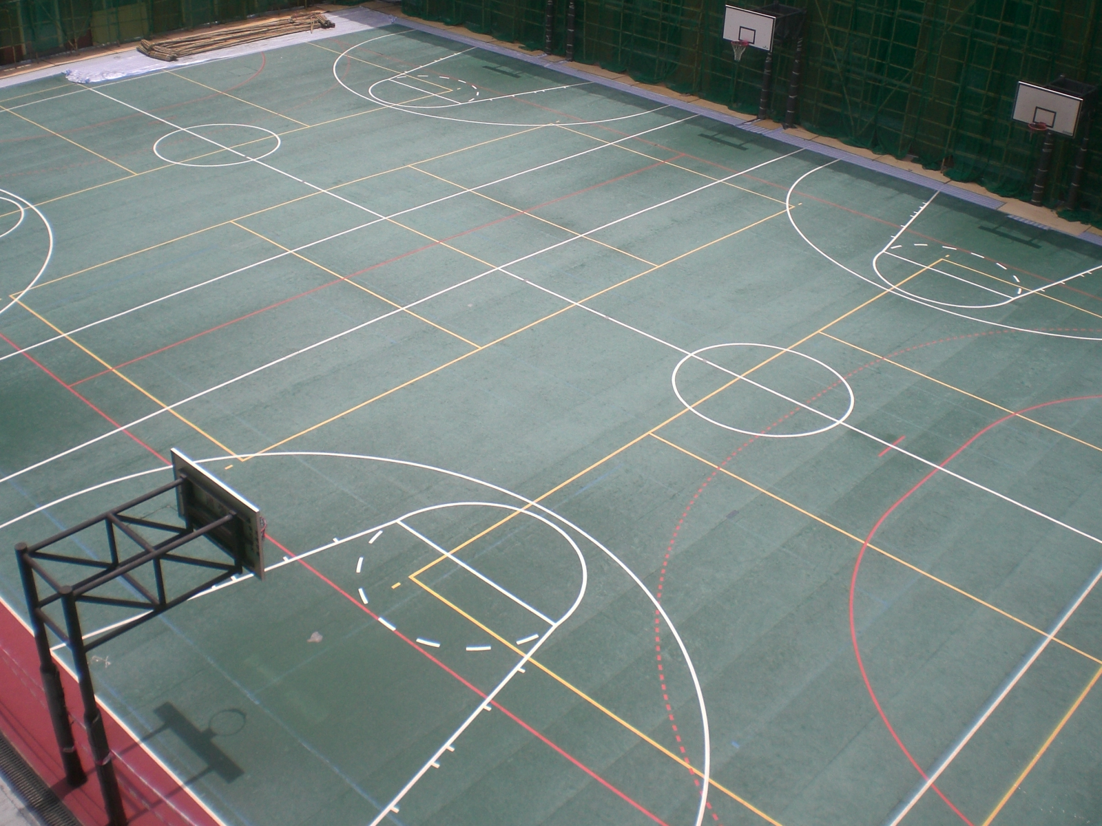 香港島般咸道英皇書院籃球場